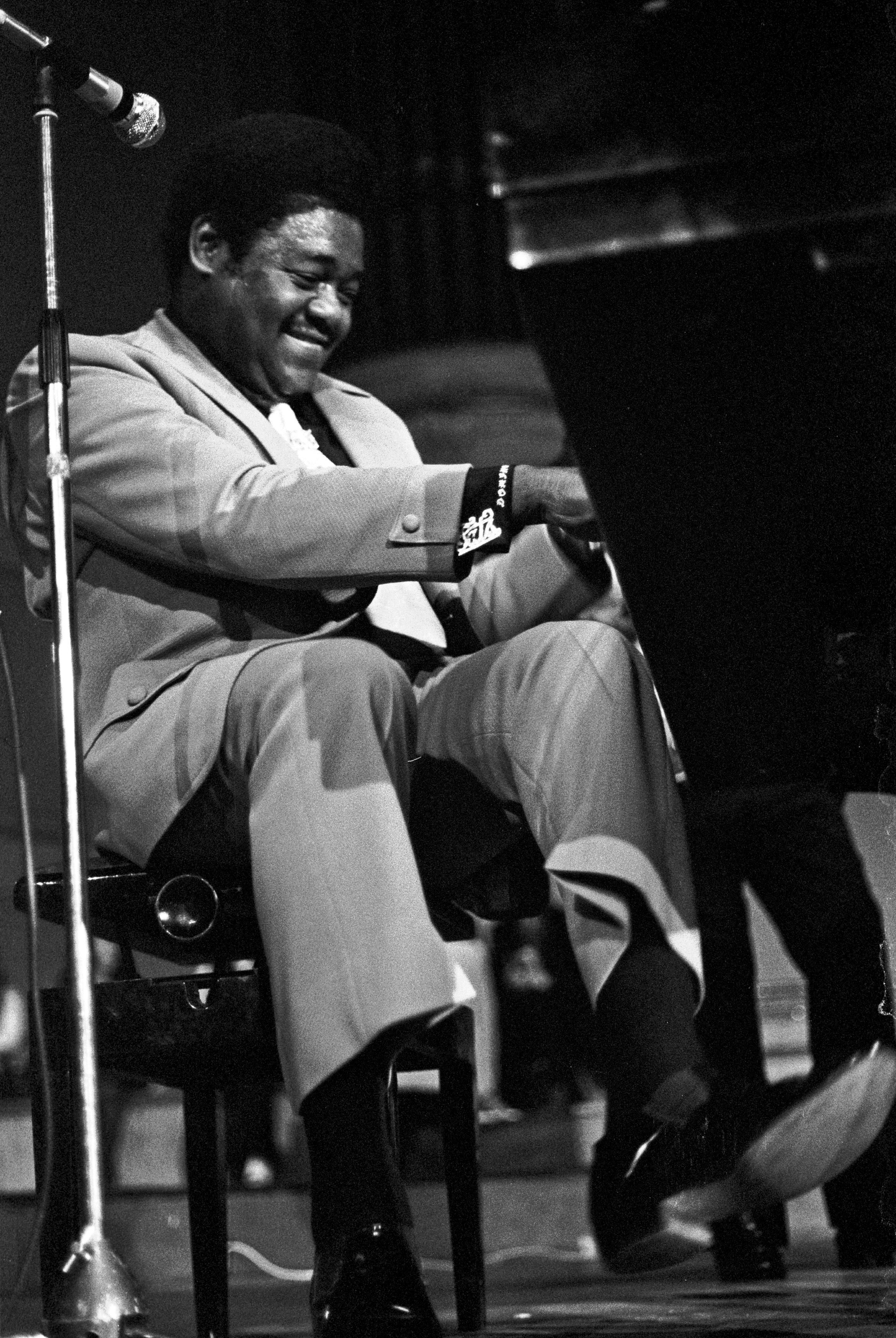 Fats Domino 1973 in der Musikhalle Hamburg: Am Schluss hat er sogar den Flügel mit dem Bauch über die Bühne geschubst